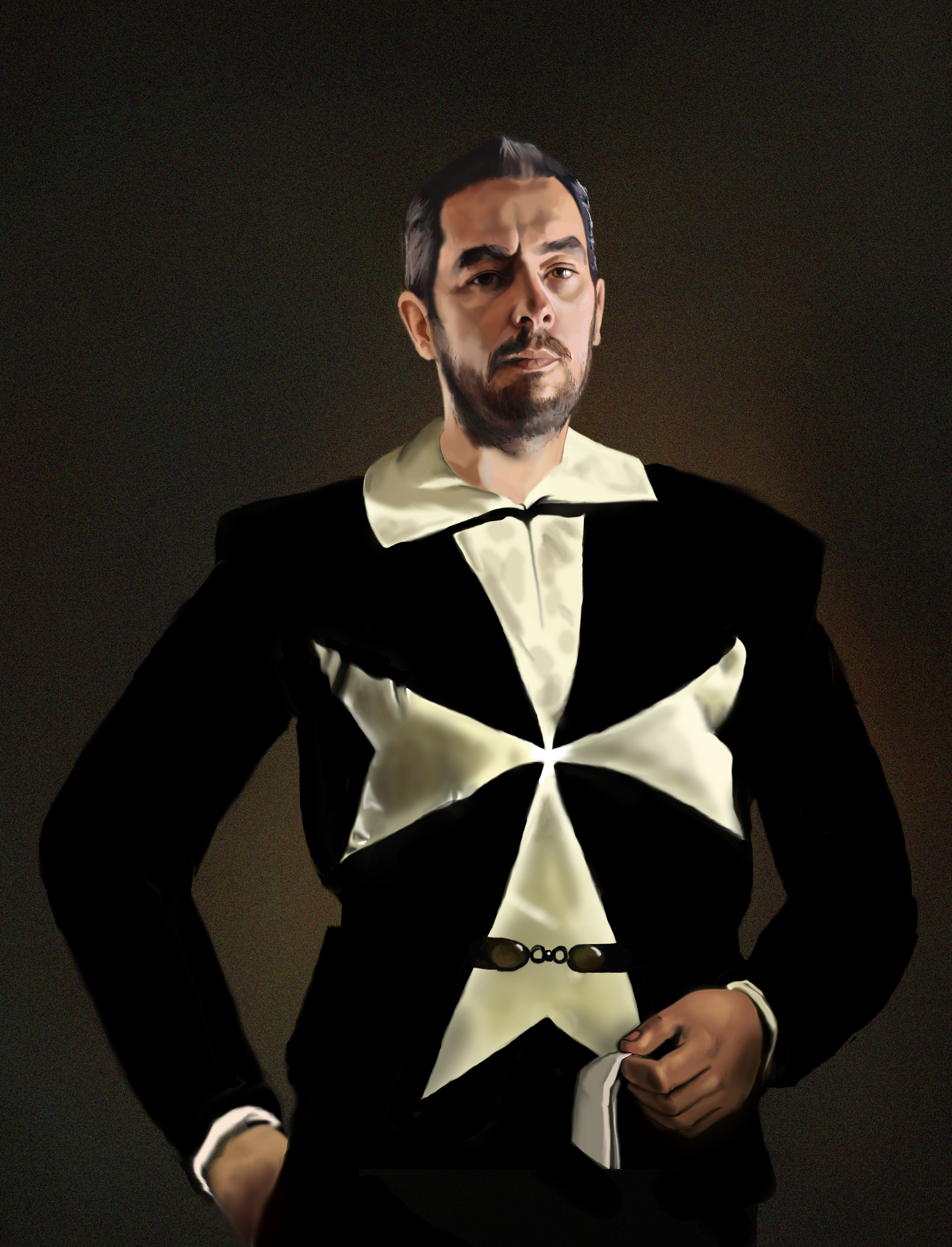 Recreación de Alonso de Contreras realizada por Miguel Zorita para la revista Madrid Histórico.